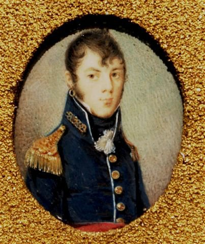 Francisco Xavier Telles de Melo Albuquerque Brito Freire Menezes e Faro Athayde e Lancastre